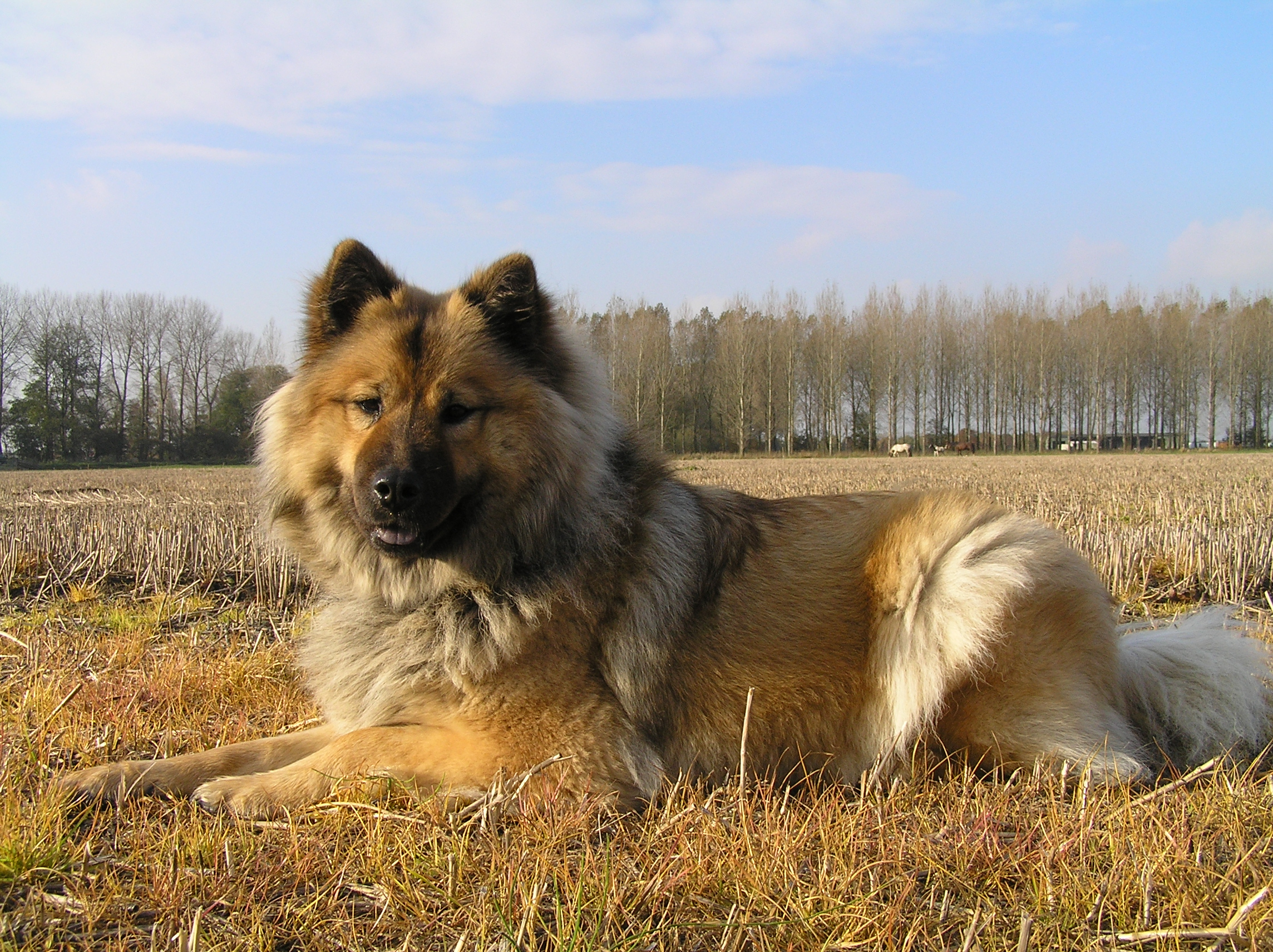 Eigen gemaakte foto van een Eurasier (hondenras)